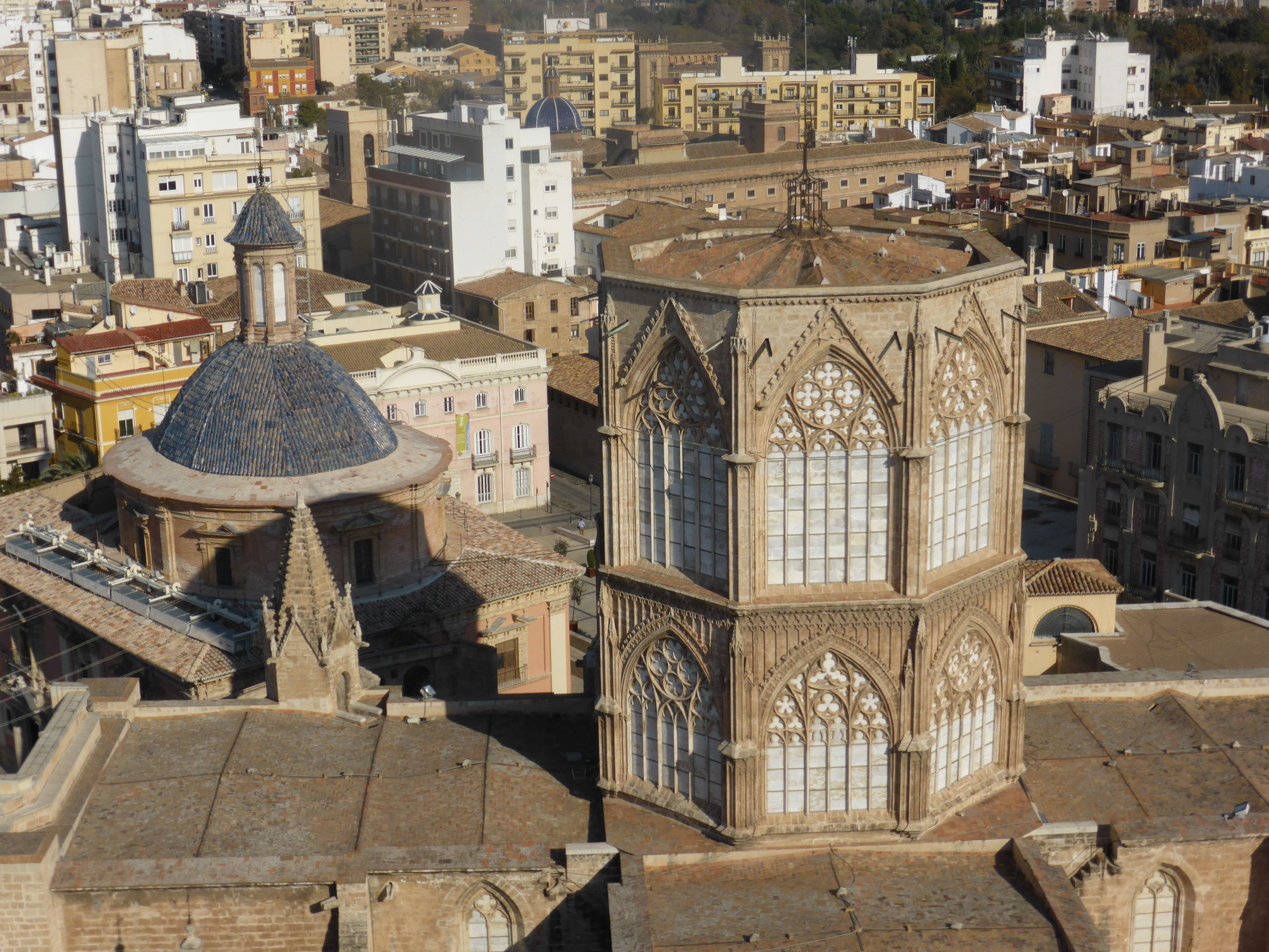 Esta fotografía está obtenida desde la terraza de la torre del Miguelete o Micalet, de la catedral de Valencia. A la izquierda, se ve la gran cúpula de tejas azuladas de la cercana Basílica de la Virgen de los Desamparados. A la derecha, vemos también el gran cimborrio gótico sobre el crucero de la catedral. La Basílica está "a la sombra" de la catedral, pues el cimborrio le está proyectando una sombra.